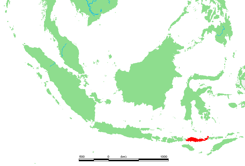 ID Tidore.PNG